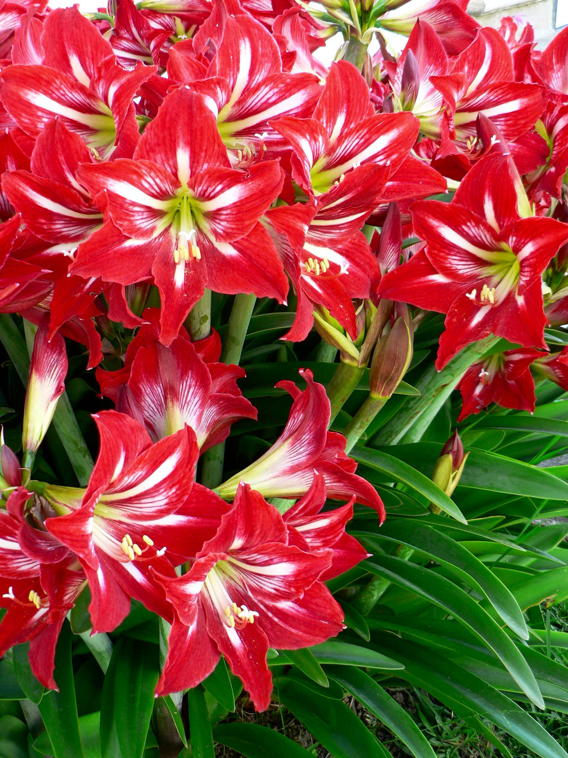 Amaryllis lilies